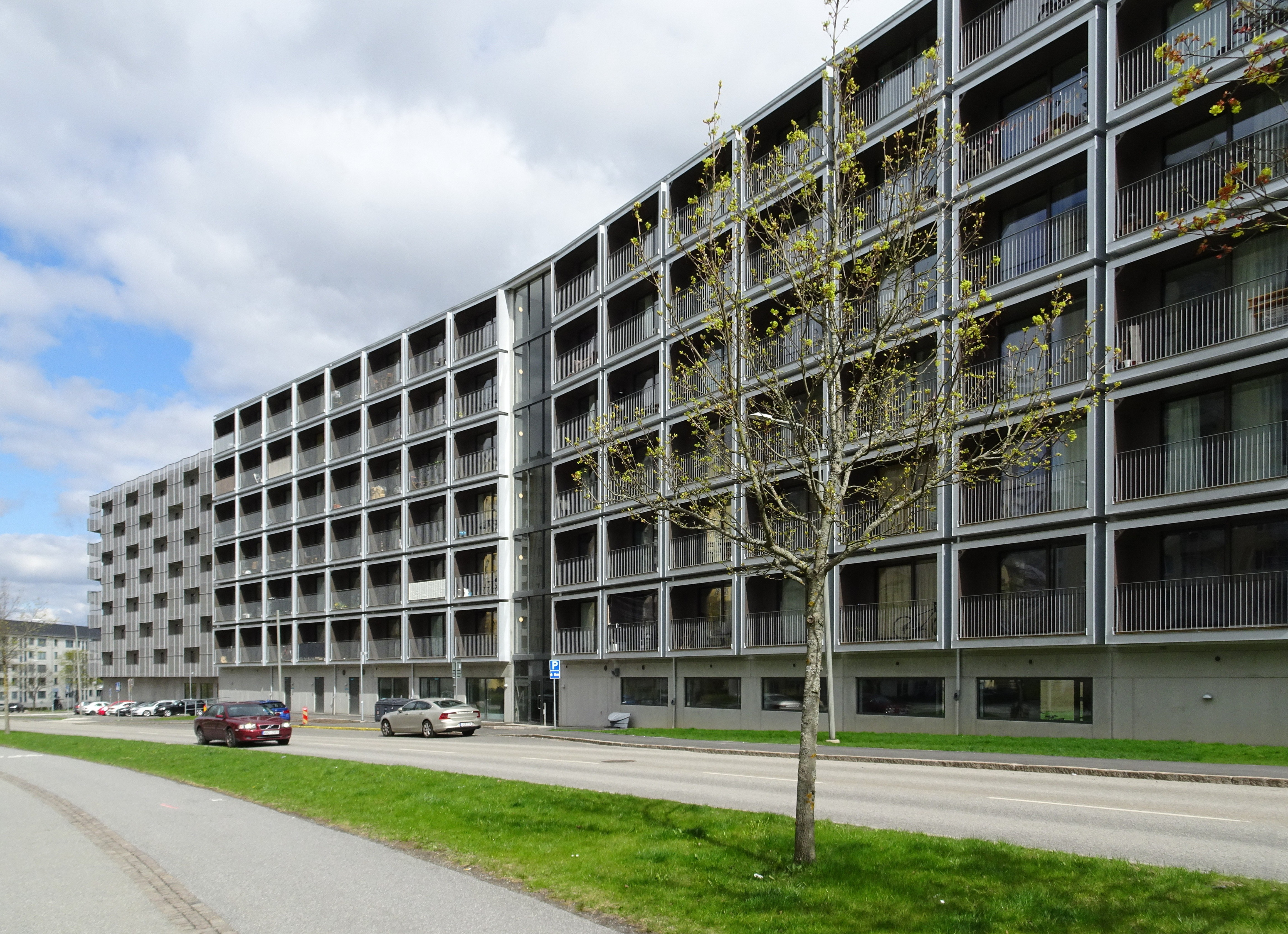 "Snabba Hus Råcksta", Råckstavägen 4-6, byggherre Svenska bostäder, arkitekt Andreas Martin-Löf Arkitekter, byggår 2019